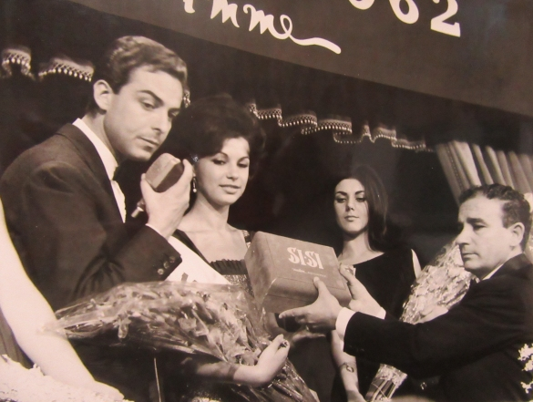 Raffaella De Carolis incoronata Miss Italia 1962